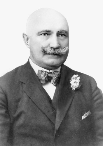 Rudolf Müller (1864 - 1955), Rakouský politik.